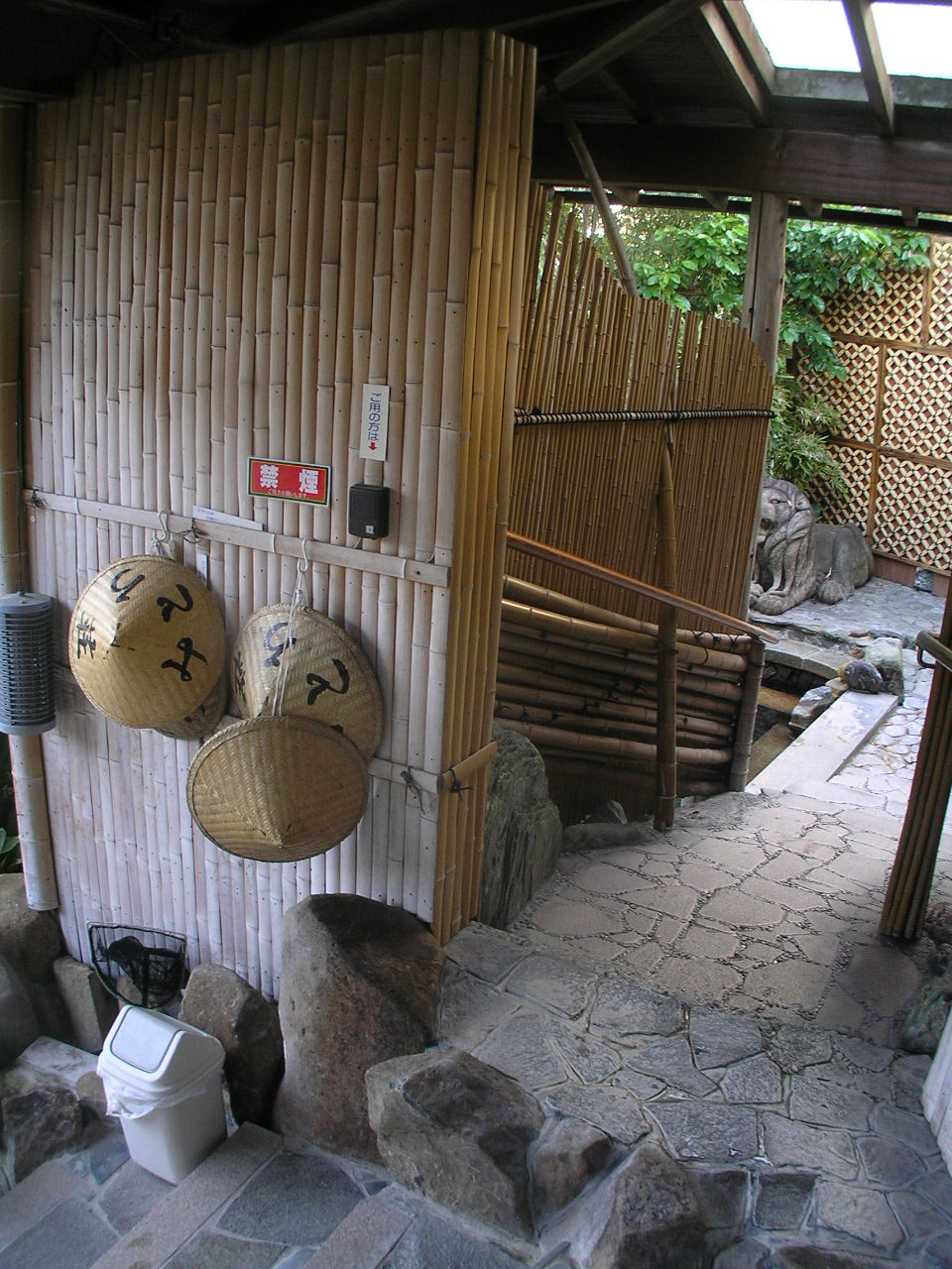 加古川温泉みとろ荘露天風呂（展望風呂）